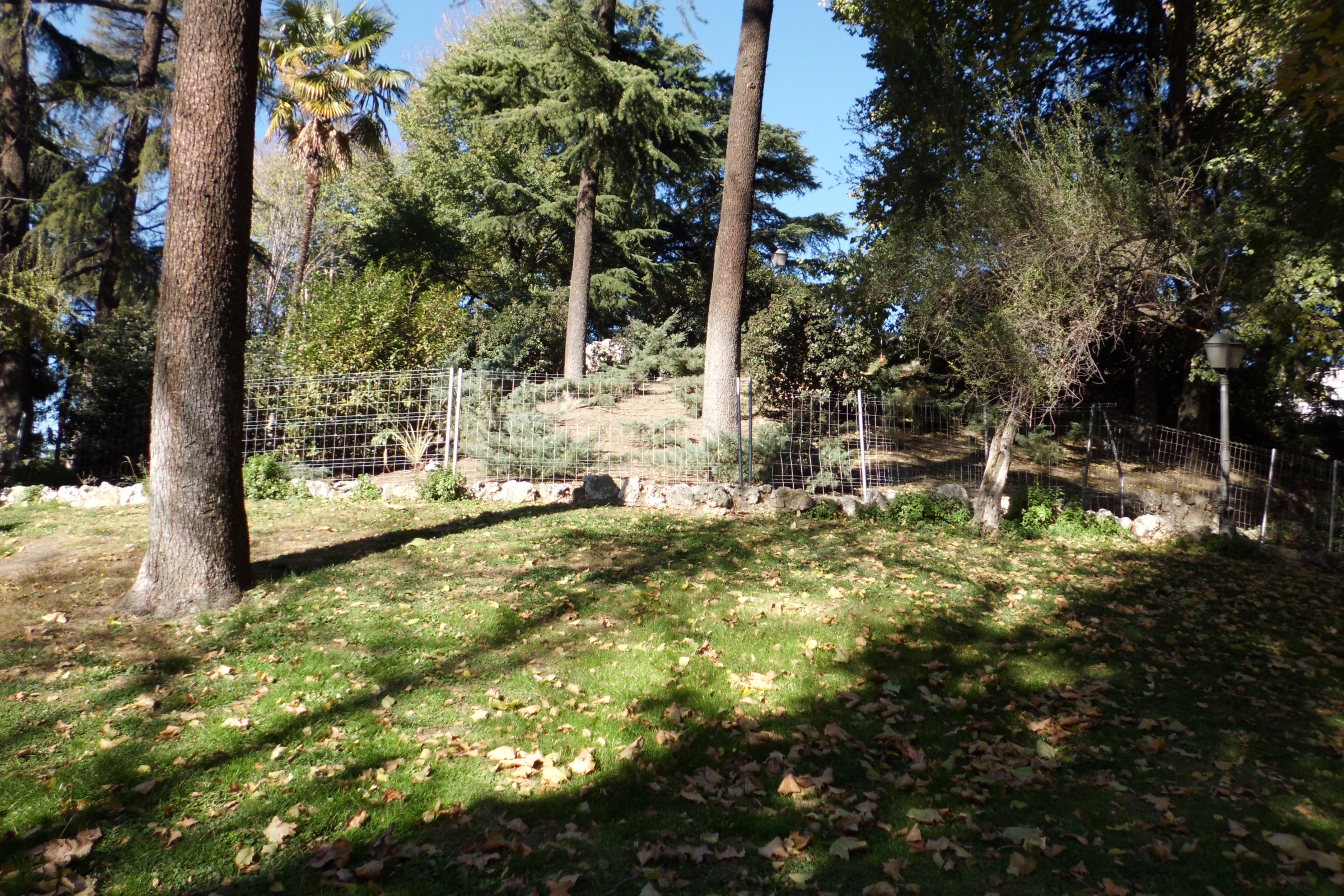 Montaña artificial llamada también montaña de los gatos. es una pequeña elevación situada en El Retiro de Madrid en cuyo entorno se hallan las ruinas de la ermita románica de San Pelayo, procedente de Ávila.